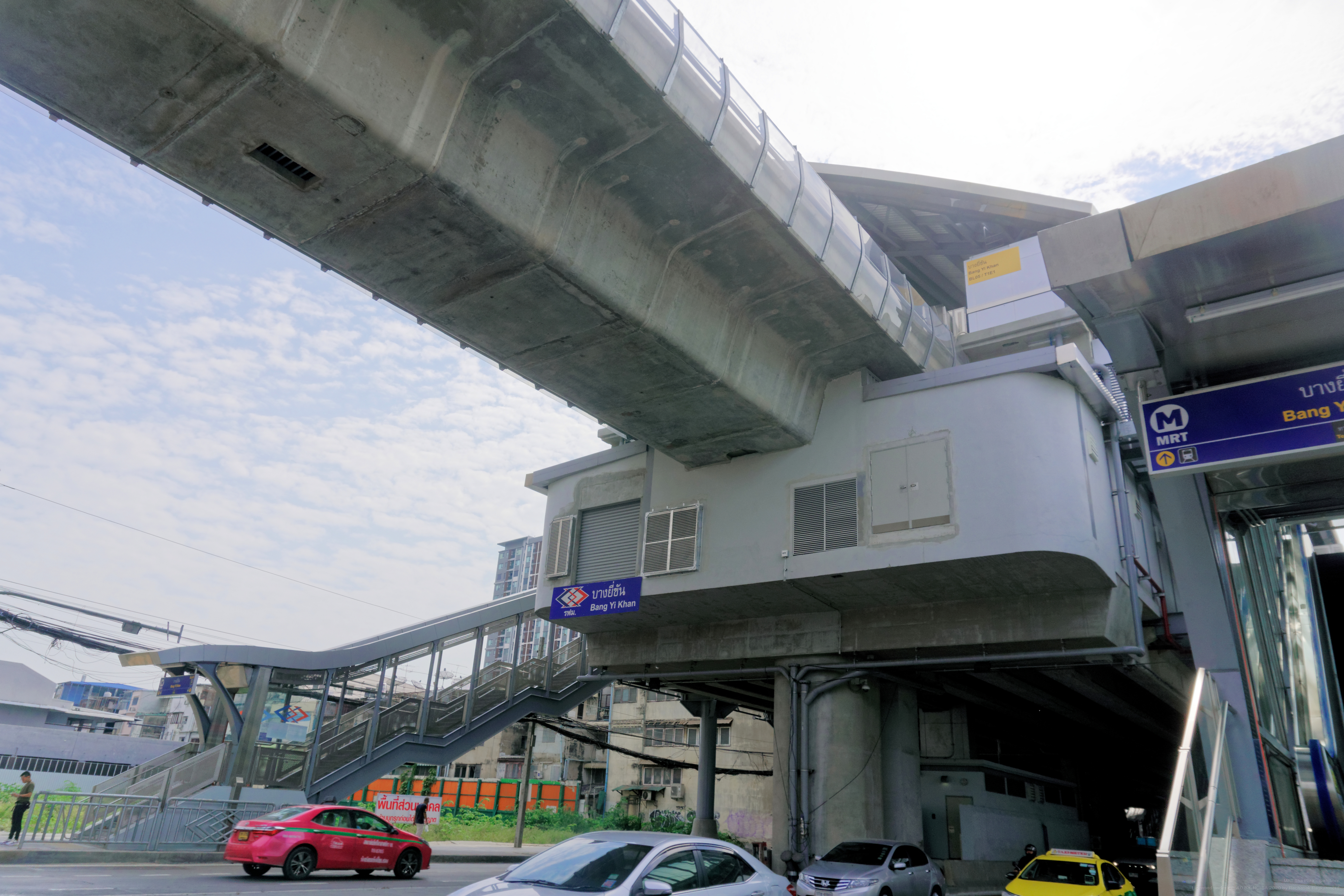 MRT Bang Yi Khan – Station